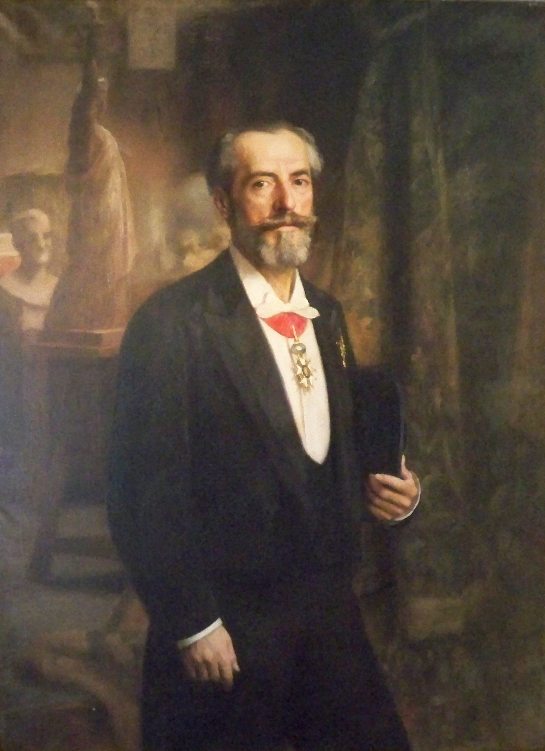 Colmar Alsazia Alsace by Daniel70mi